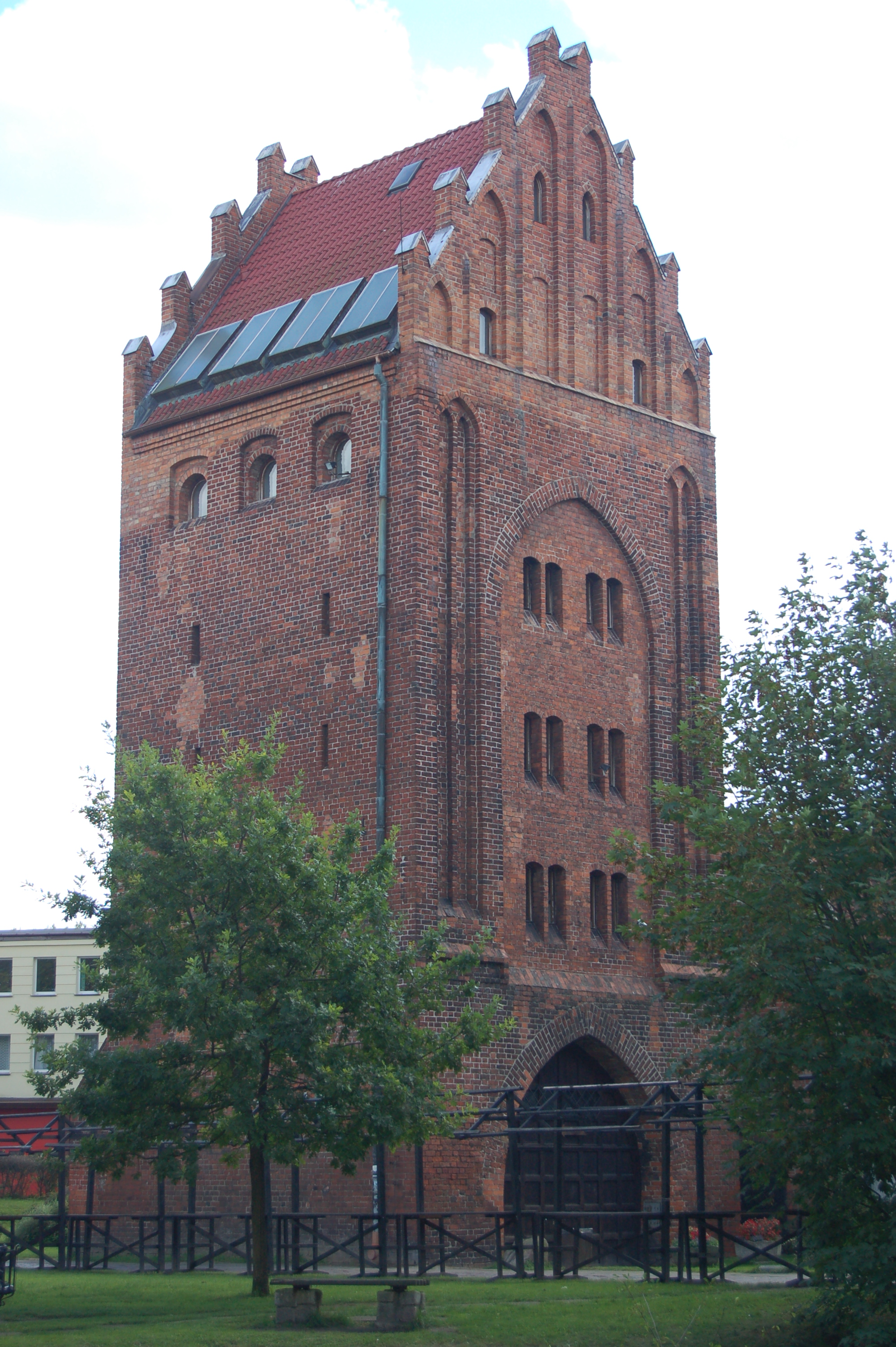 Brama Młyńska w Słupsku